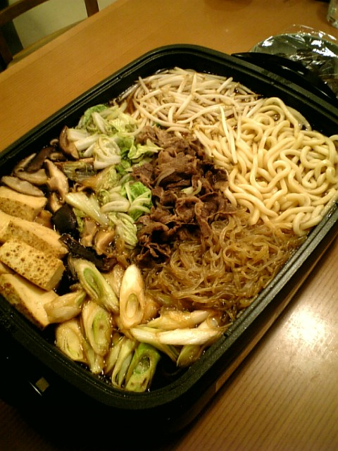 今夜はうどんすき。美味しい。美味しい。